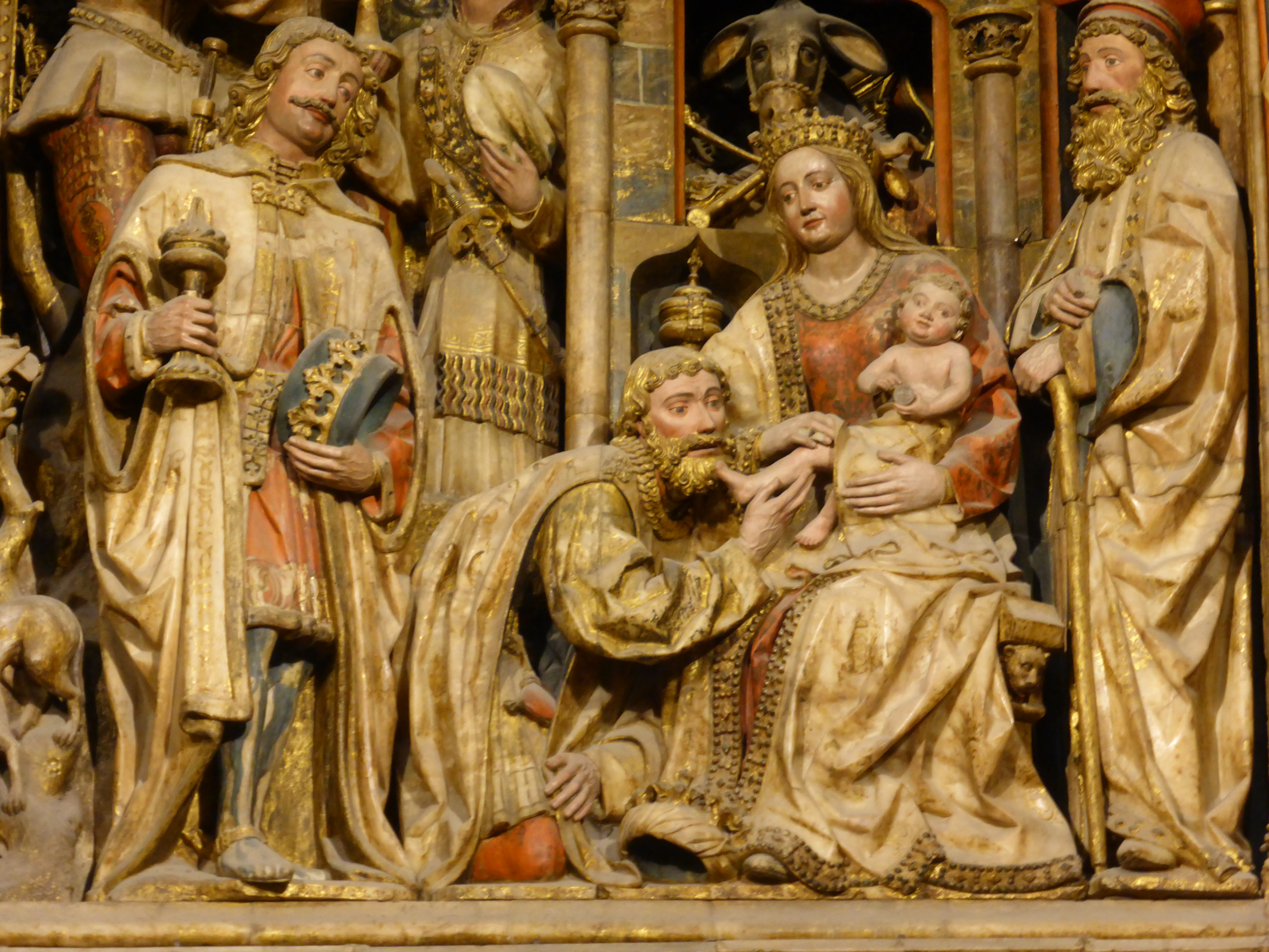 Figuras en alabastro policromado. Escena central de la Epifanía, o Adoración de los Reyes Magos, en el retablo mayor de la Seo de Zaragoza. Arte gótico, del siglo XV. Escultor: Hans de Suabia.